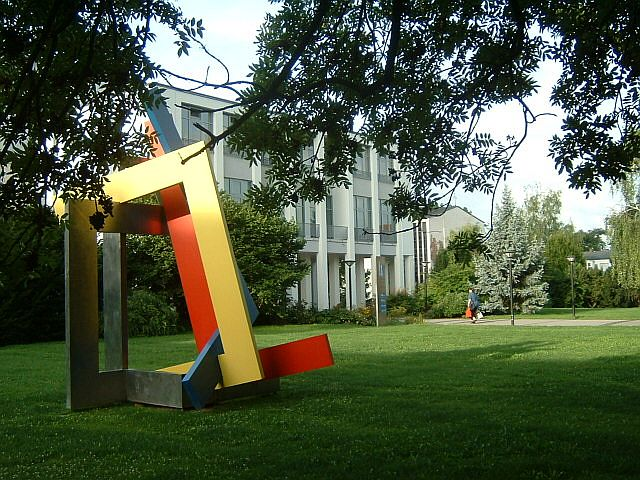 Haupteingang des HR in Frankfurt in der Straße Am steinernen Stock, im Vordergrund ein Kunstwerk von Rudolf Valenta (geb. 1929): Große Herula (2000). Edelstahl, teilweise beschichtet, 560x390x300 cm. Mehr...